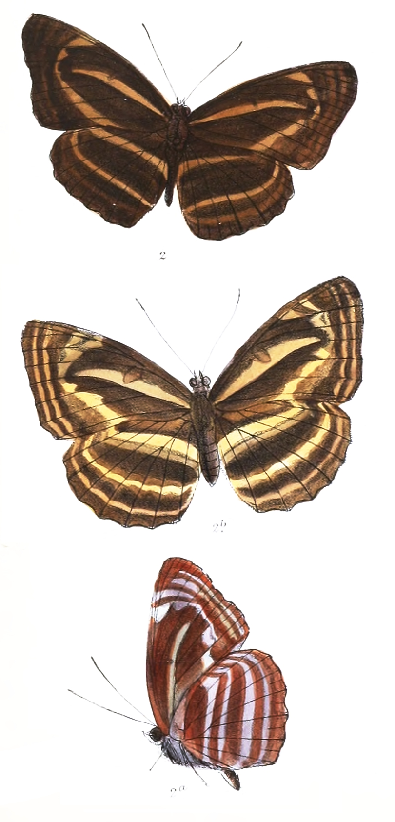 Bimbisara anjana= Neptis anjana